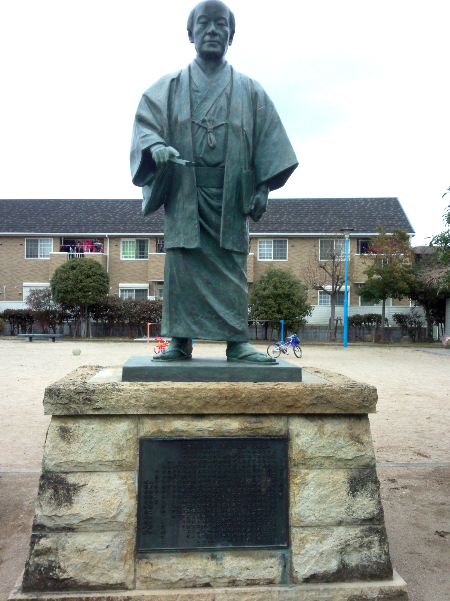 山片蟠桃の像（高砂市）